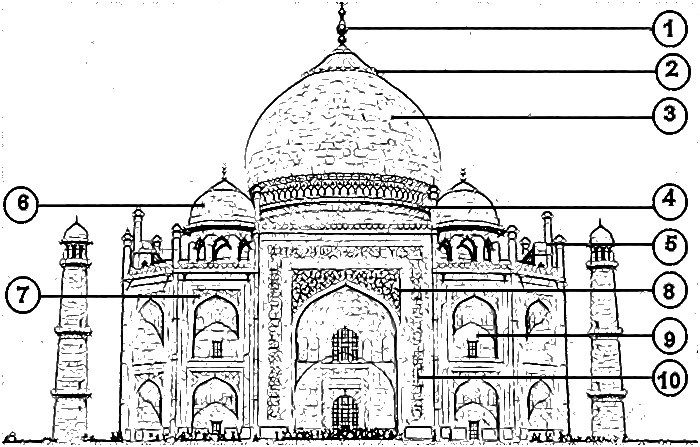 Taj Mahal, Agra, India - Componentes formales sin texto